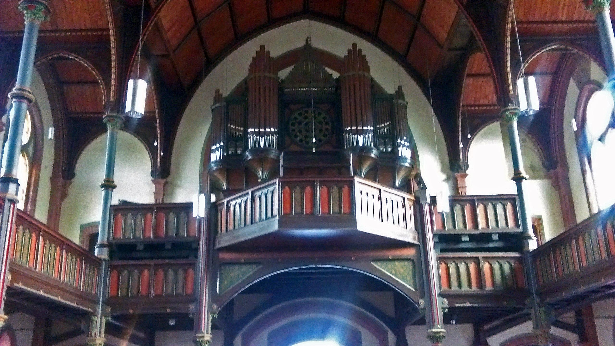 Evangelische Alte Kirche in Essen-Altenessen, erbaut 1890, Sauer-Orgel, unter Denkmalschutz